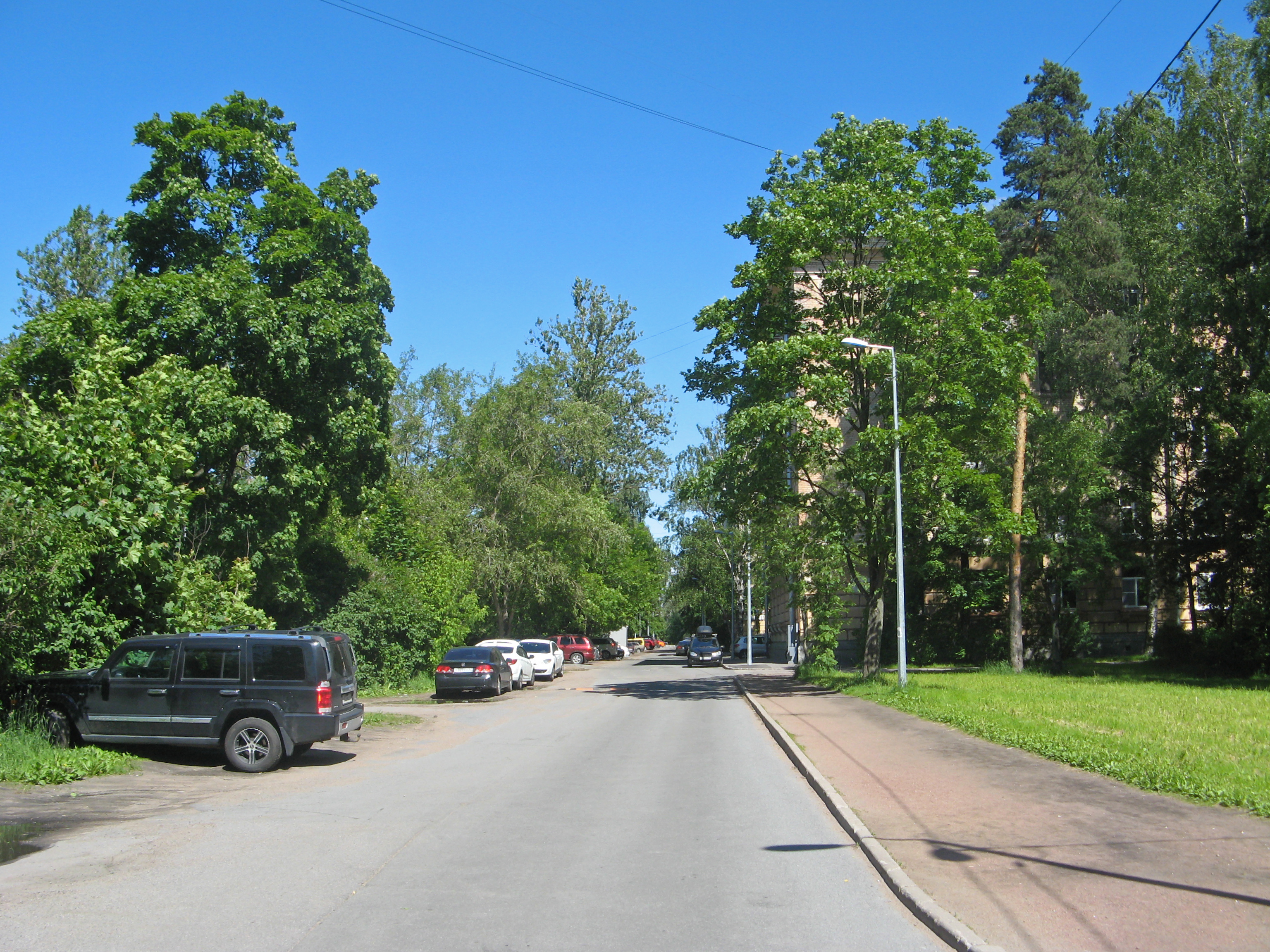 Яковская улица в Санкт-Петербурге